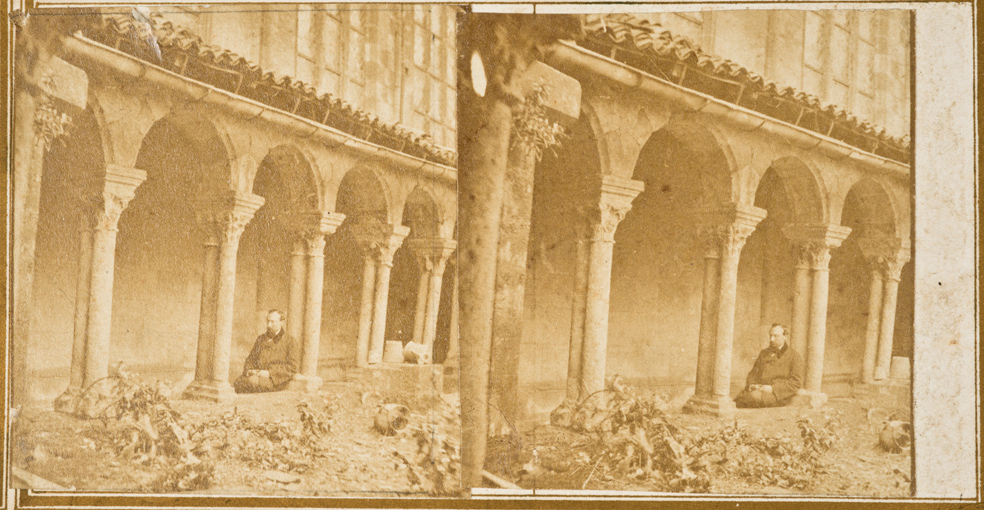 Autoportrait d'Alfred Perlat (1829-1910) dans le cloître de l'église Notre-Dame-la-Grande de Poitiers avant sa démolition en 1859 (photo prise en mars 1859, retirage vers 1860). Épreuve stéréoscopique sur papier albuminé sur carton (coll. médiathèque François-Mitterrand, Poitiers)